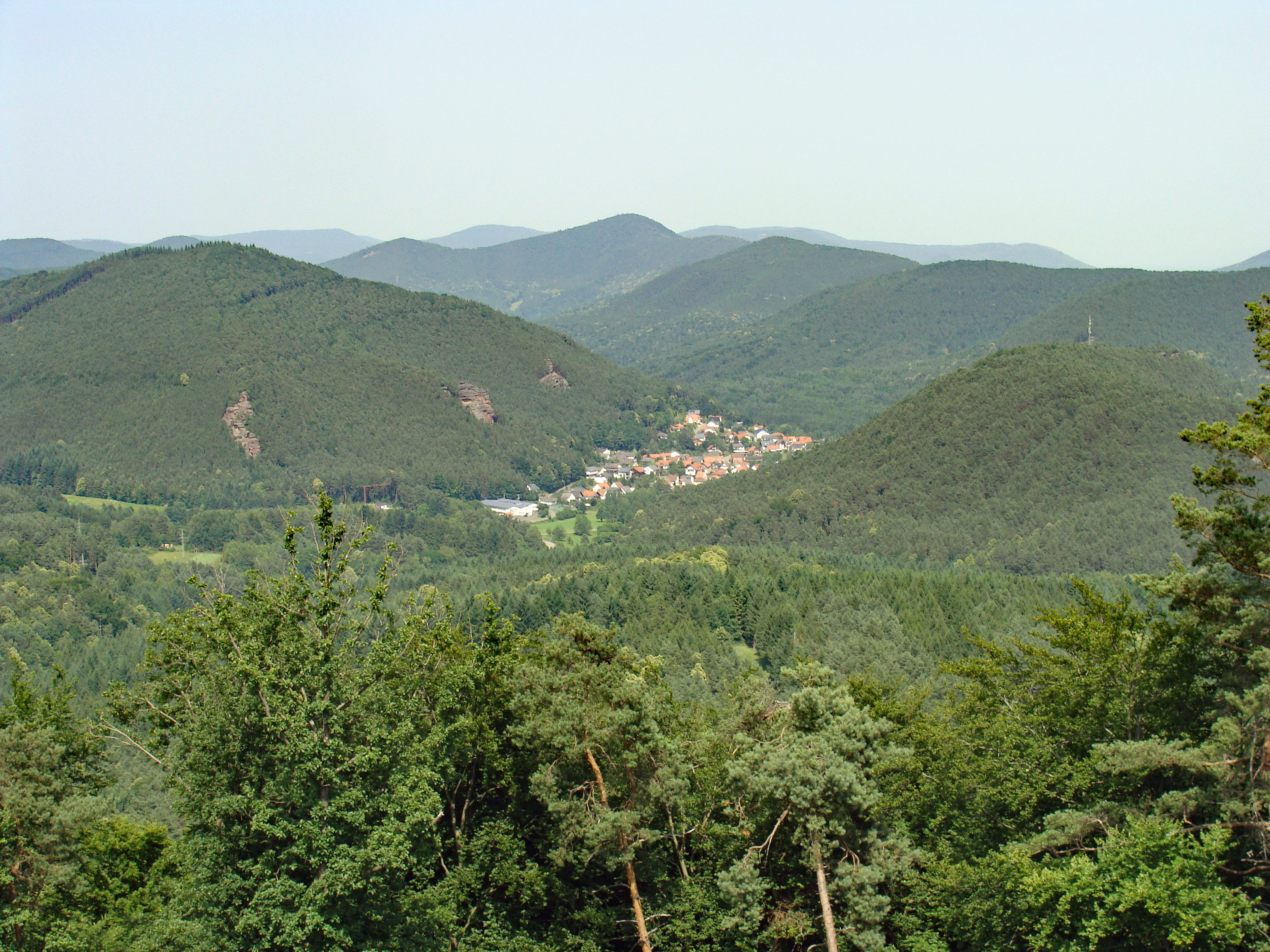 Lug (Pfalz) - Blick vom Hühnerstein